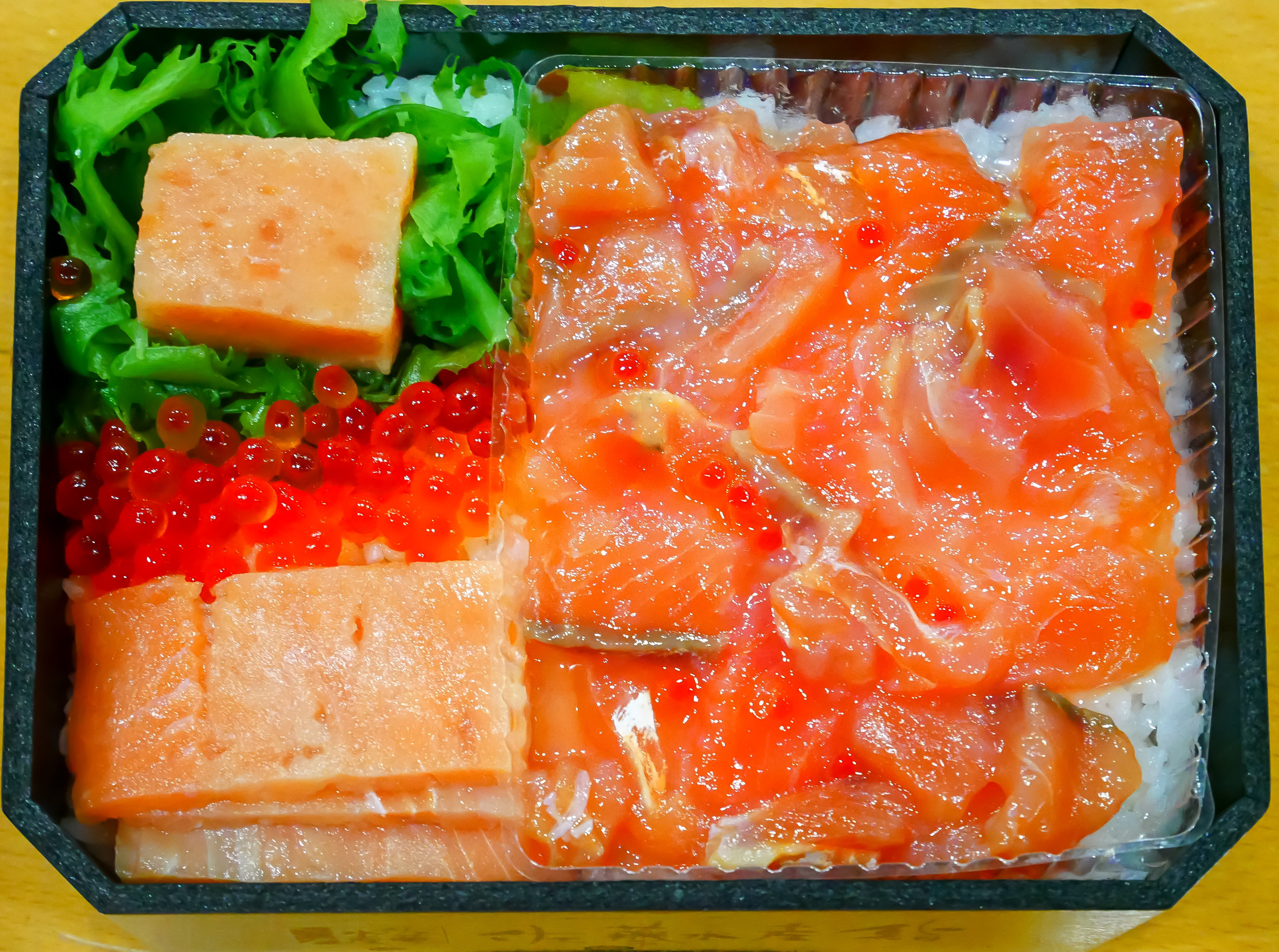 北海道千歳市、佐藤水産の鮭のルイベ漬盛り海鮮弁当、新千歳空港、空弁、東京駅購入